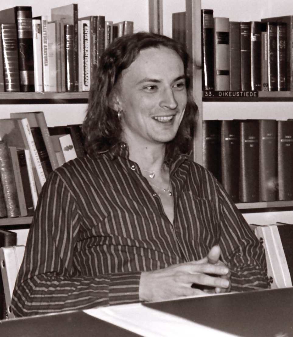 Harri Sirola Kuusankosken kirjastossa 1983